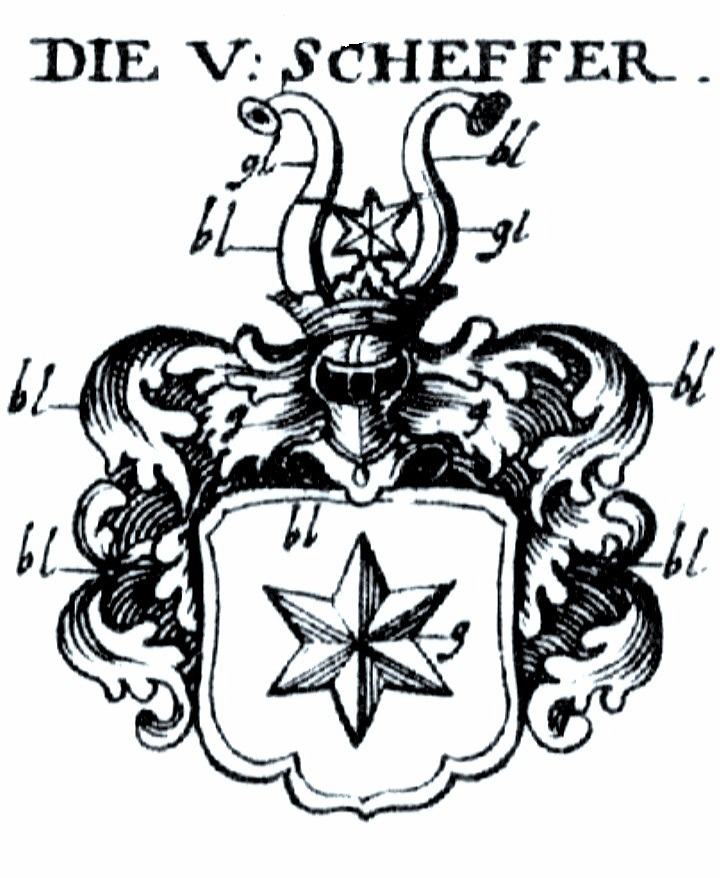 Wappen derer von Scheffer in Siebmachers Wappenbuch, Tafeln der 9. Ausgabe 1701 und der 10. Ausgabe 1705, nach dem Faksimile von 1975. Tafel aus Teil 5. Tafel 138.